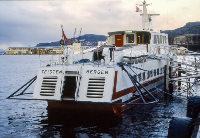 Teisten ved kai i Bergen